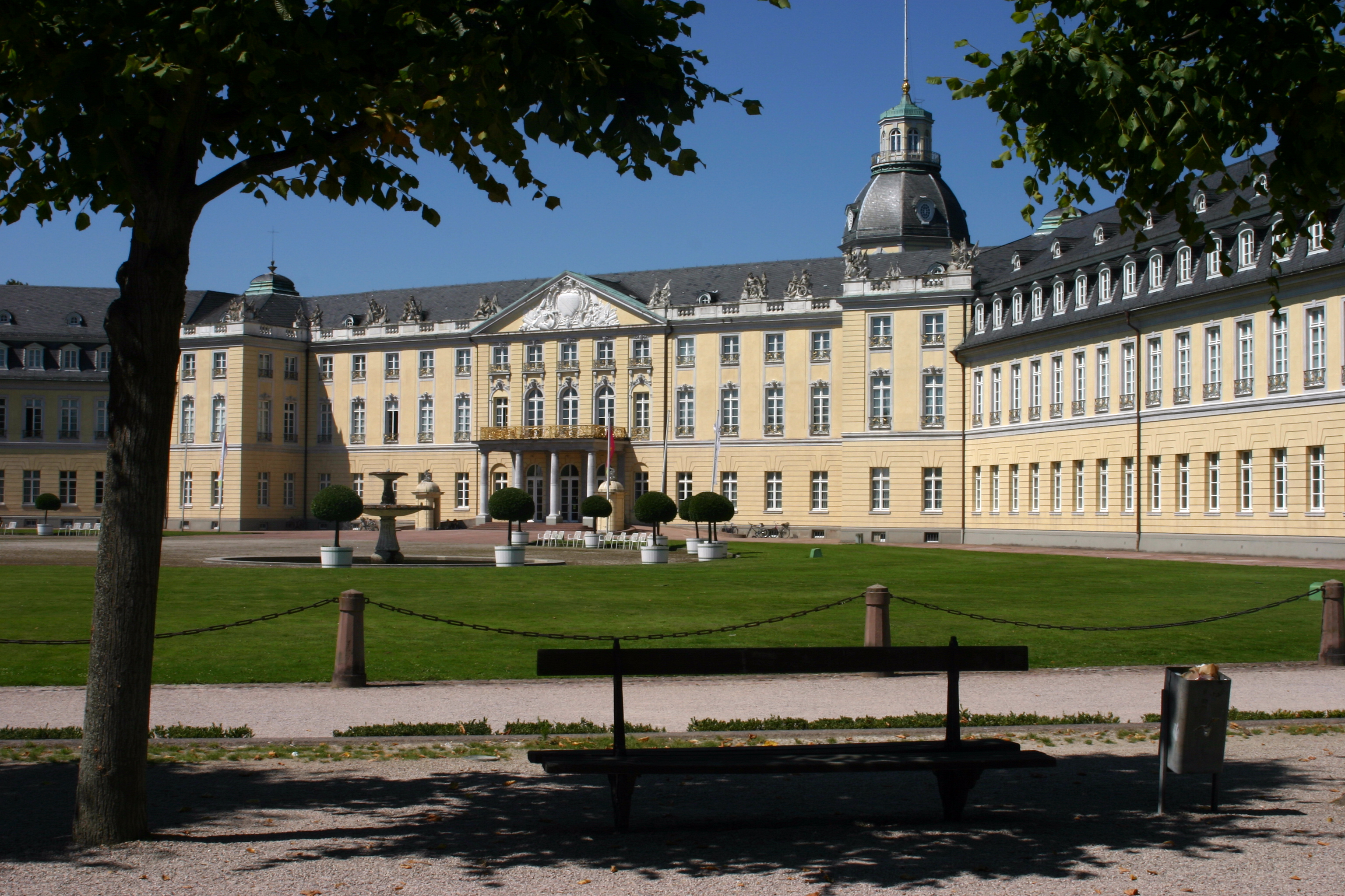 Karlsruher Schloss